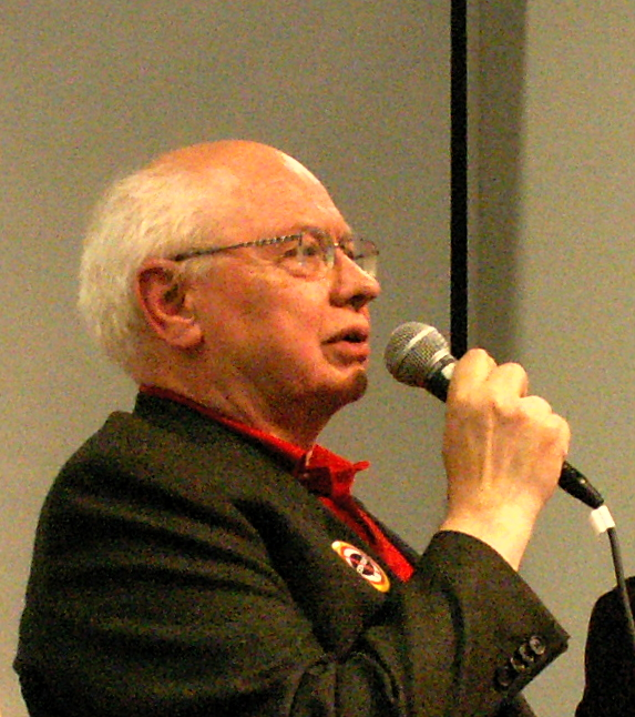 Serieförfattaren Magnus Knutsson, vid censurdebatten på Bokmässan i Göteborg 2011.